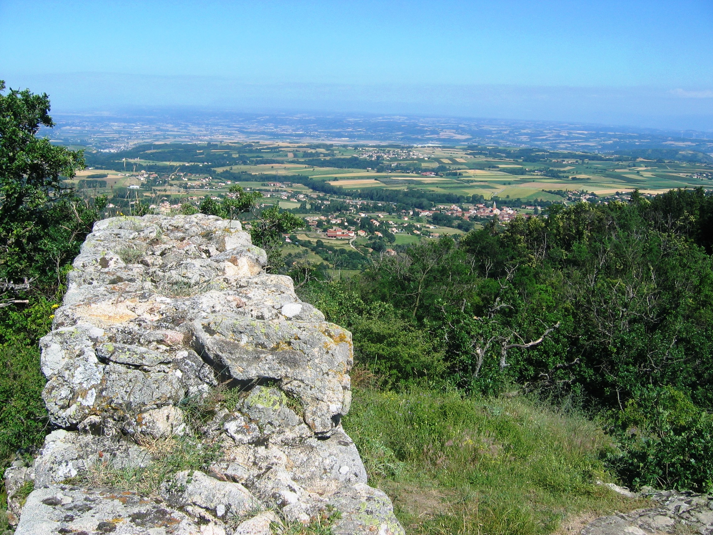 Savas St Julien en Goye mur et paysage